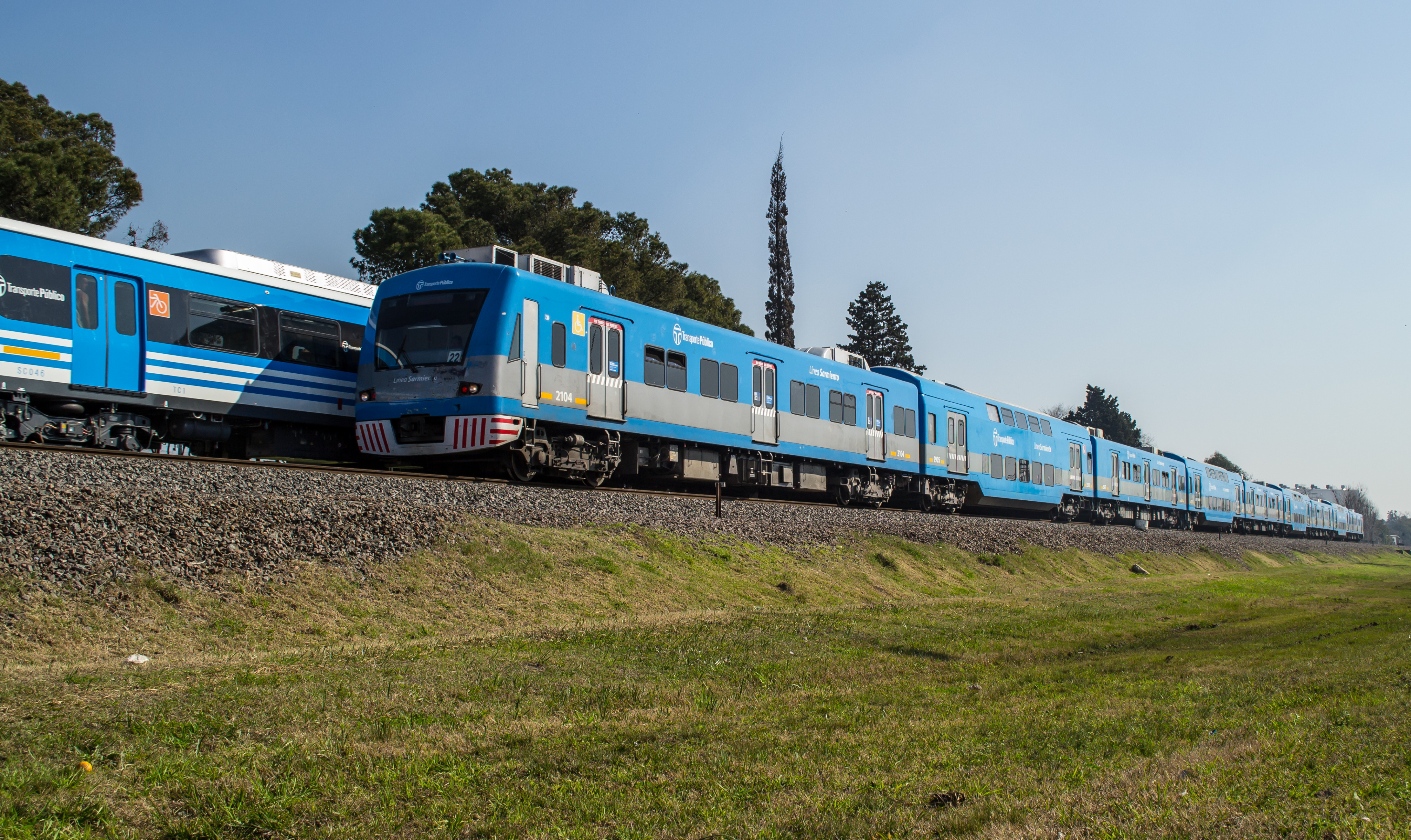 Tren toshiba de doble piso, de la Línea Sarmiento, en cercanías de Paso del Rey rumbo a Once. Detrás, una formación CSR rumbo a Moreno.